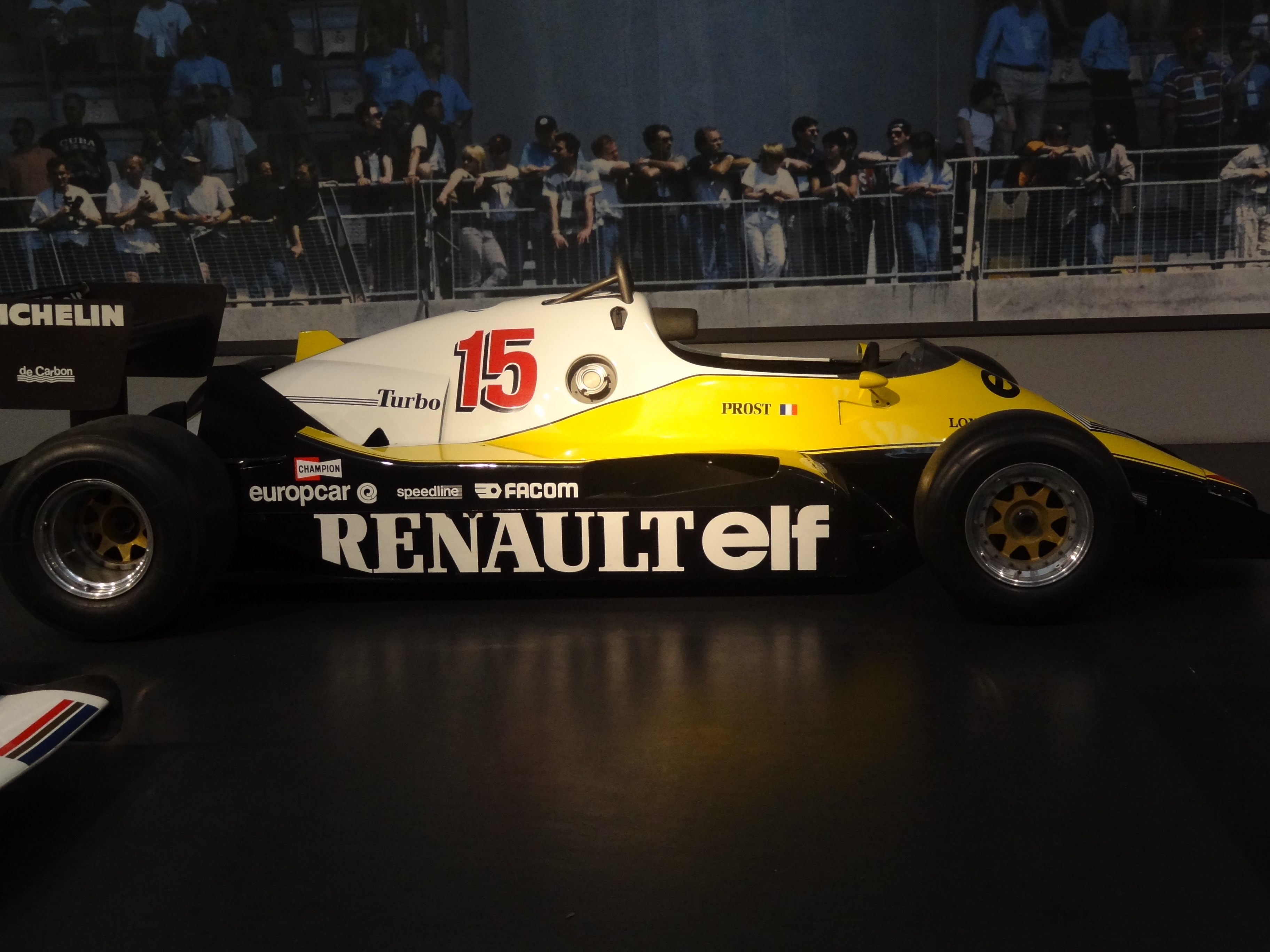 Renault F1 RE40 (1983)